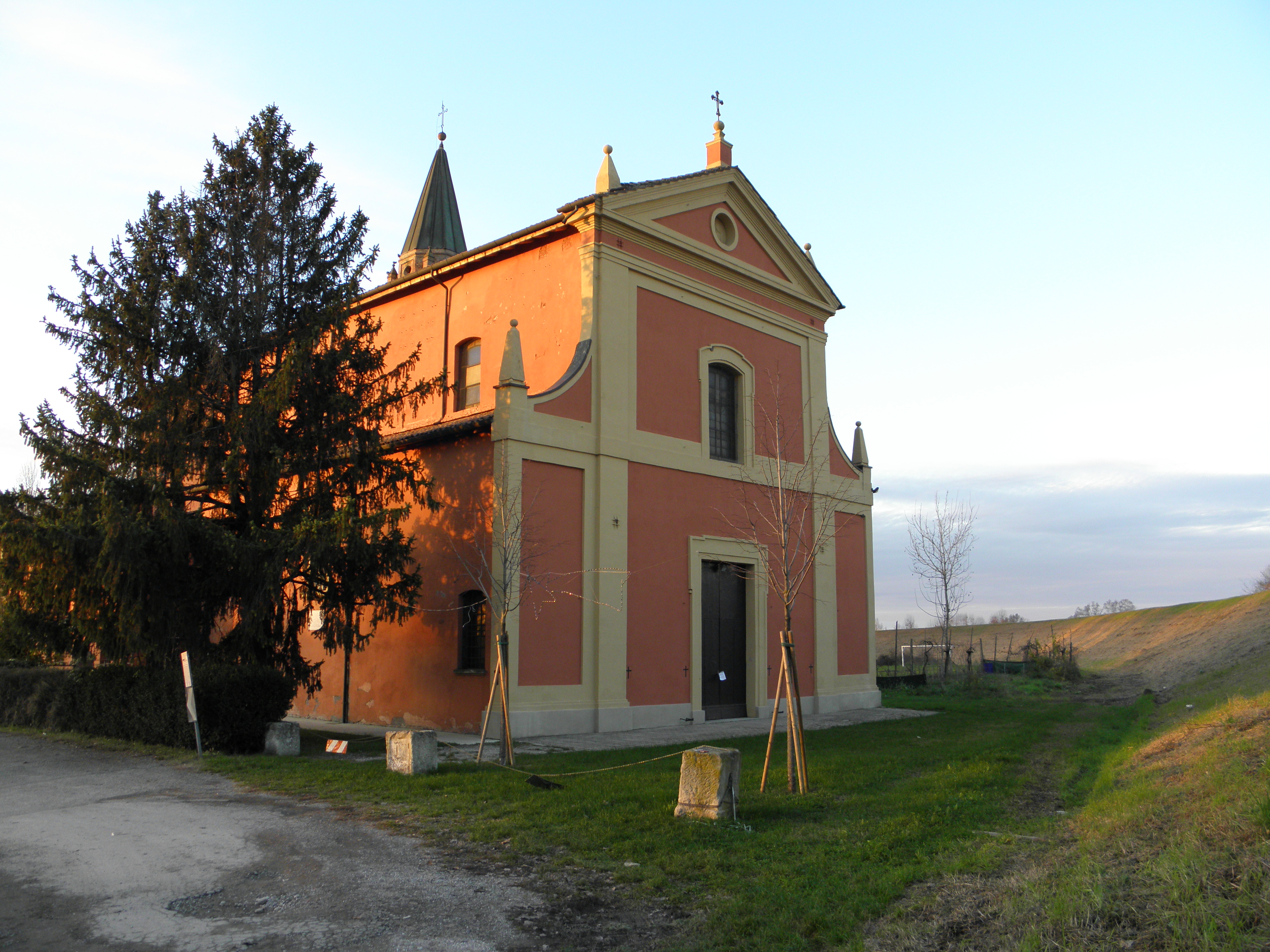 Bonconvento, frazione di Sala Bolognese: la chiesa parrocchiale di San Biagio a Bonconvento (XVIII secolo).